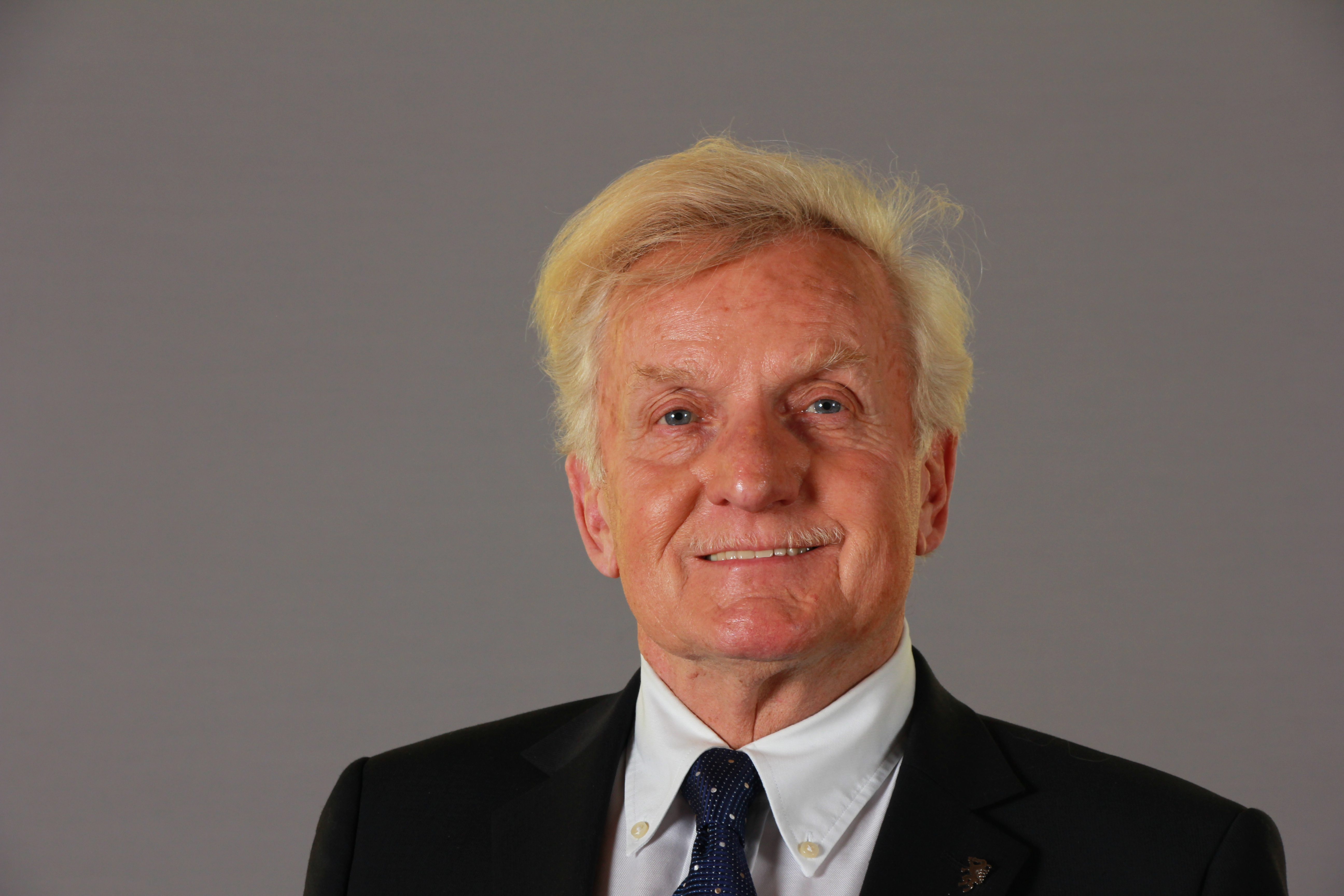 Gregor Hammerl, Abgeordneter zum österreichischen Bundesrat